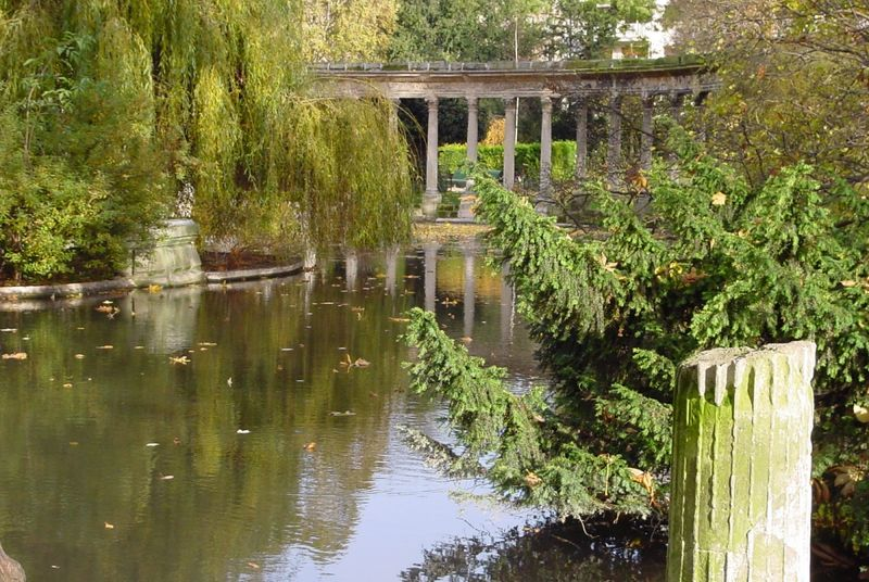 La roseraie du parc Monceau en Automne, Paris, Ile de France Photo prise en décembre 2001. Libre de droit. Proviens de Free On Line Photos.